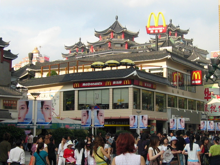 ShenZjen_Dongmen.jpg的裁剪图，用于麦当劳相关条目，来突出图片的主题